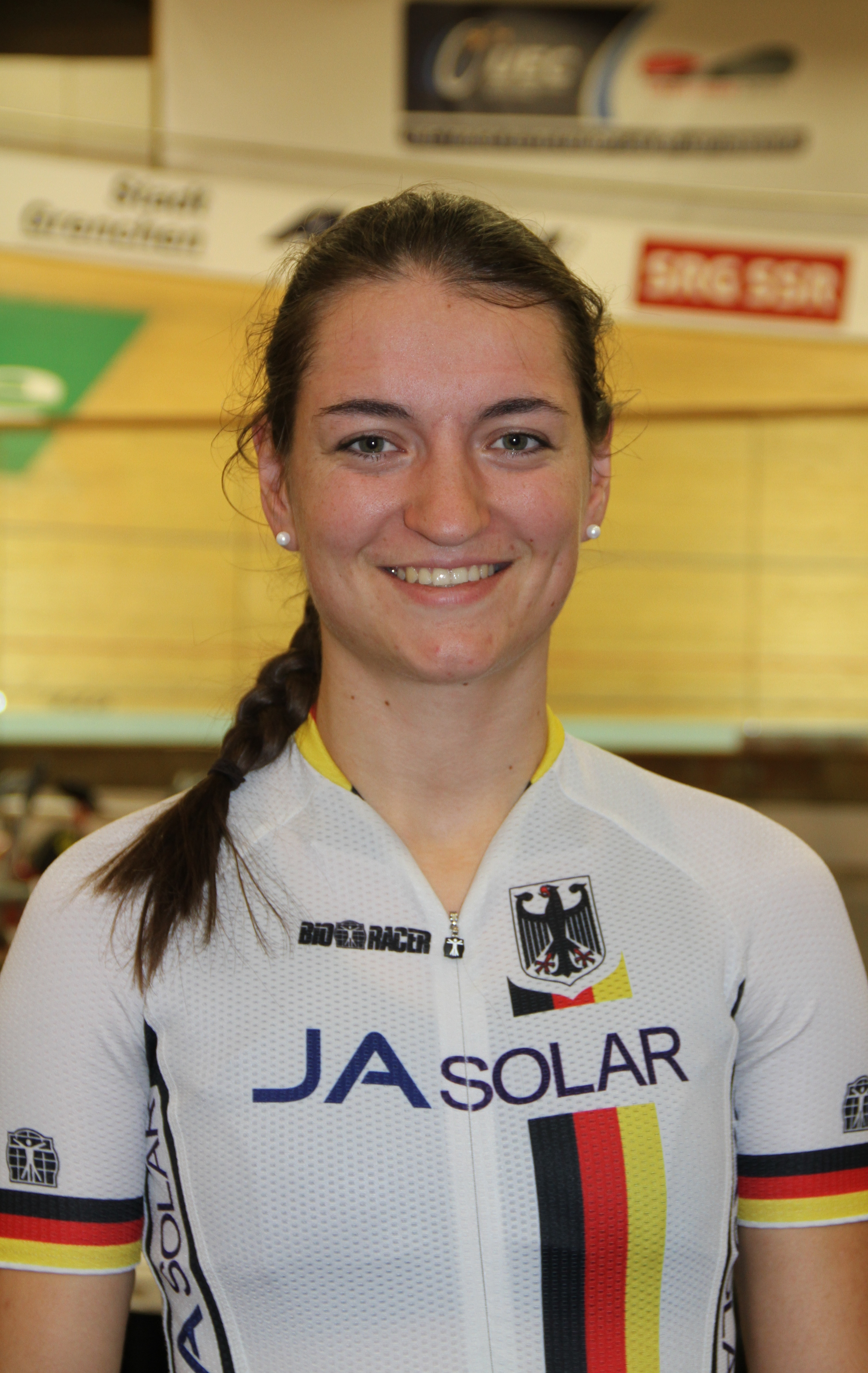 Anna Knauer, deutsche Radsportlerin The making of this document was supported by the Community-Budget of Wikimedia Germany.